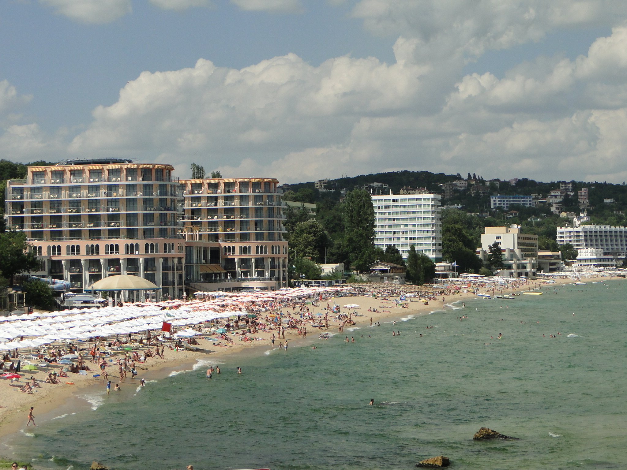 Св. св. Константин и Елена